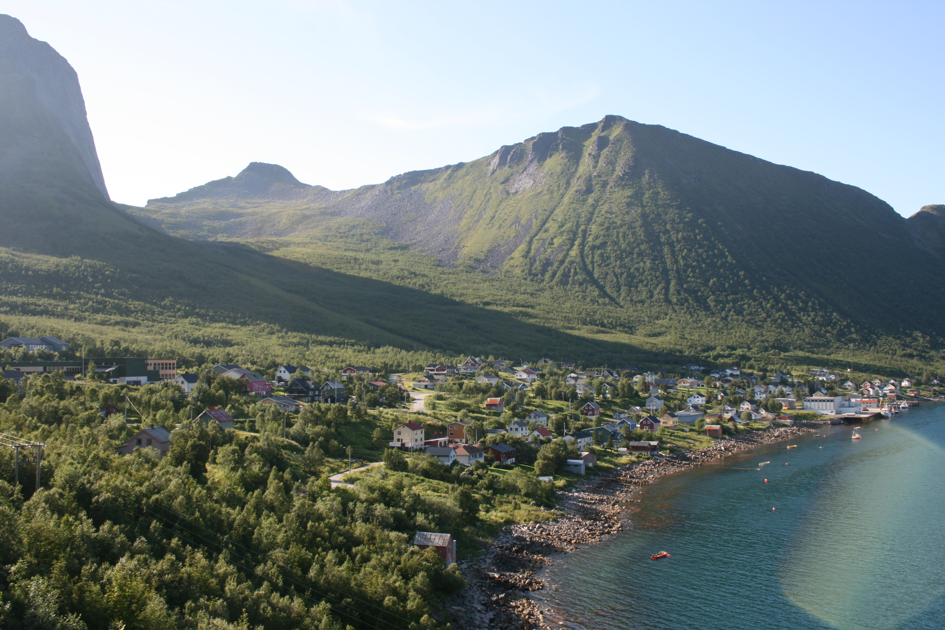 Fjordgard